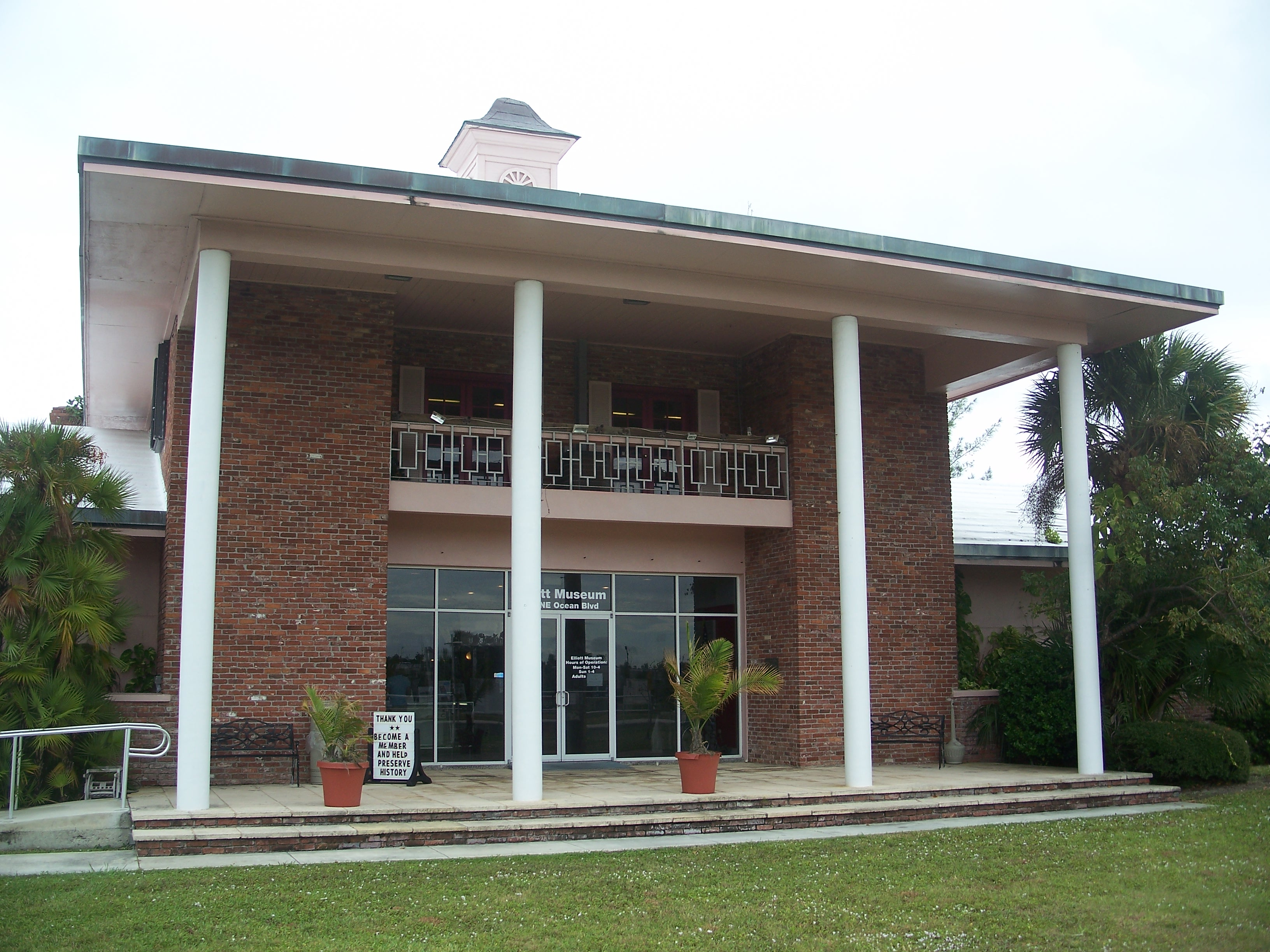 Stuart, Florida: Elliott Museum